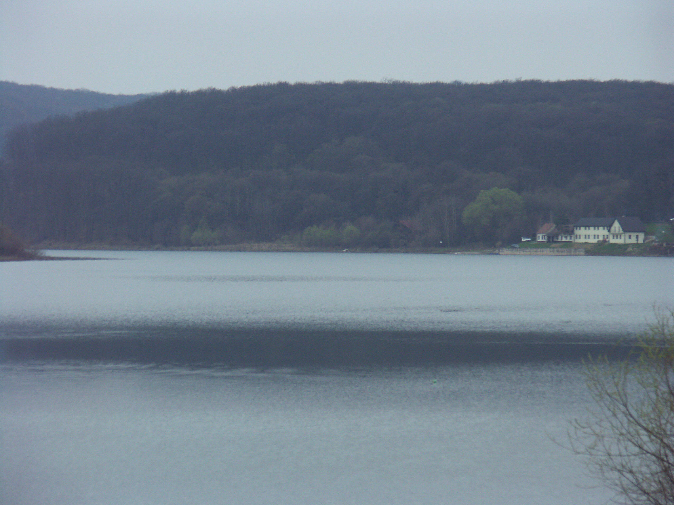 Author: Radovan Bahna, Slovakia, April 2006